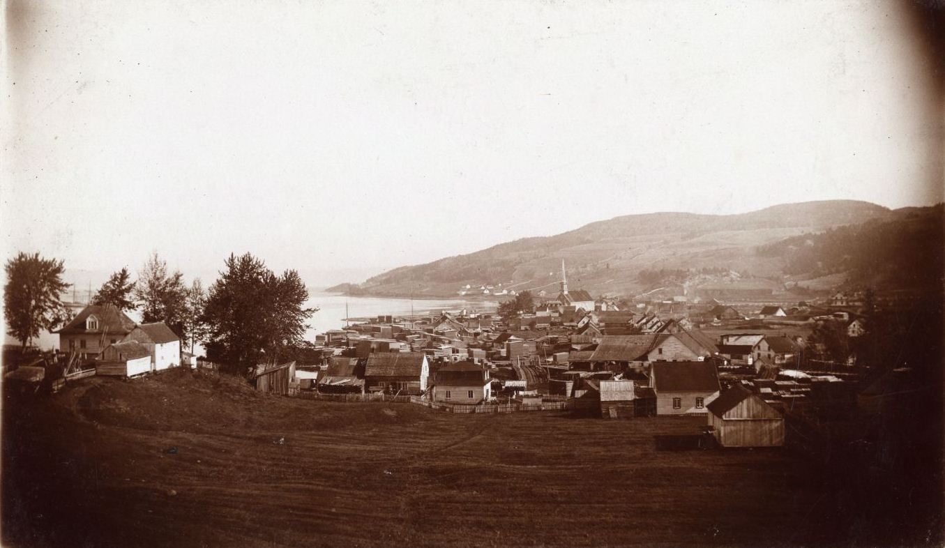 Saint-Alexis-de-la-Grande-Baie, 1898